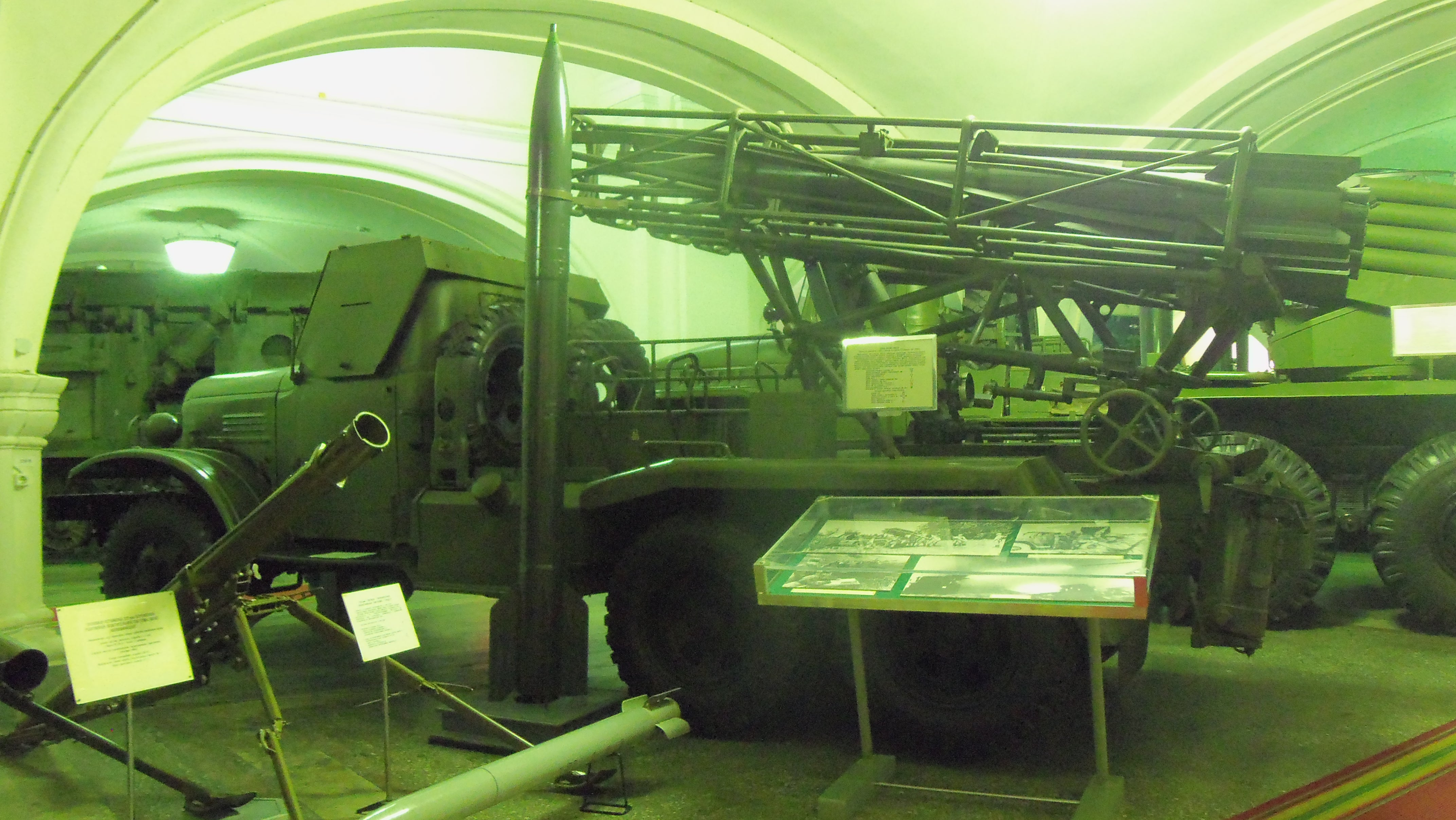 БМД-20 в Военно-историческом музее артиллерии, инженерных войск и войск связи в Санкт-Петербурге